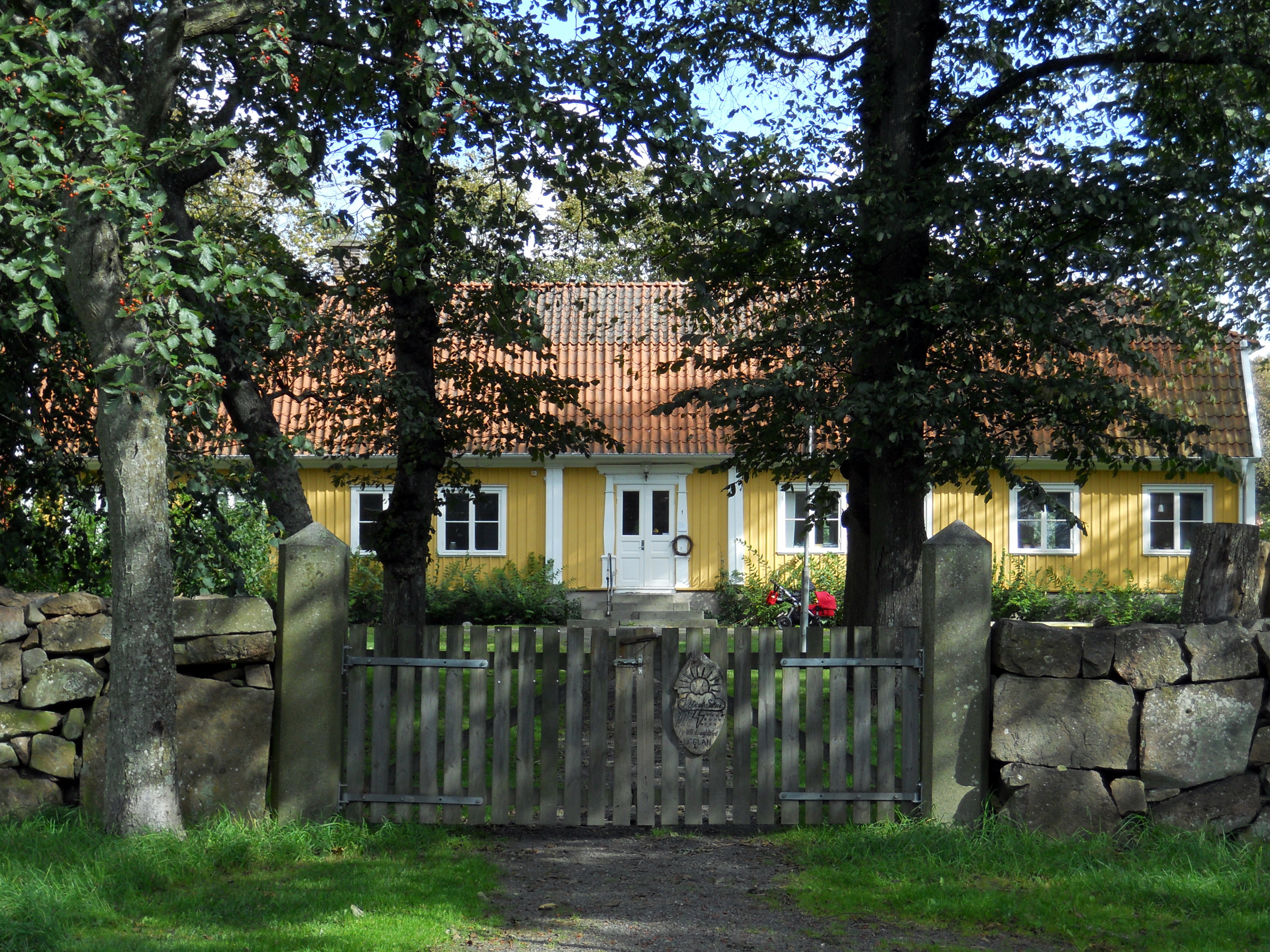 Landeriet Freden, Varberg. Mangårdsbyggnad.